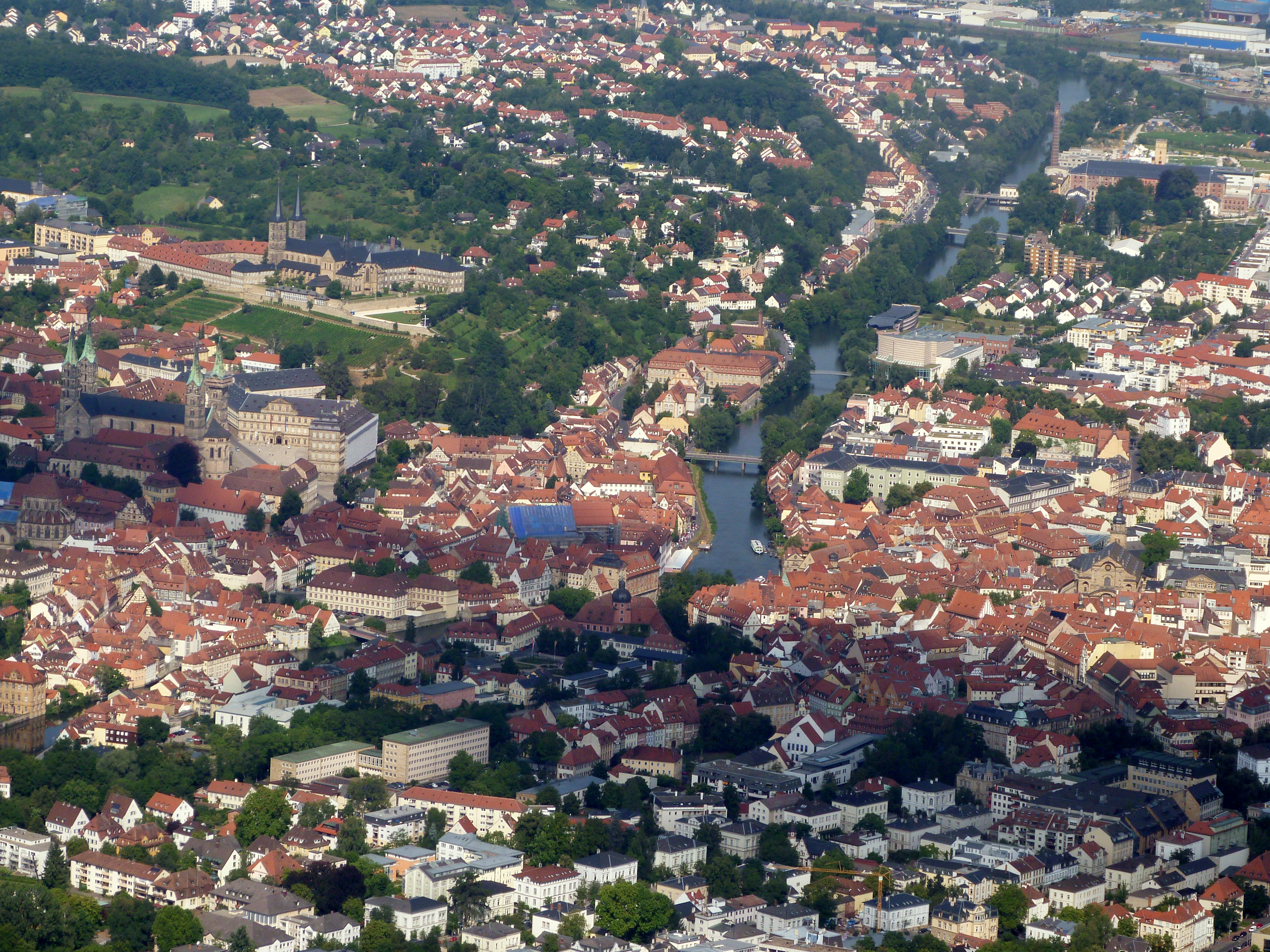 Bamberg aus der Flugzeugperspektive